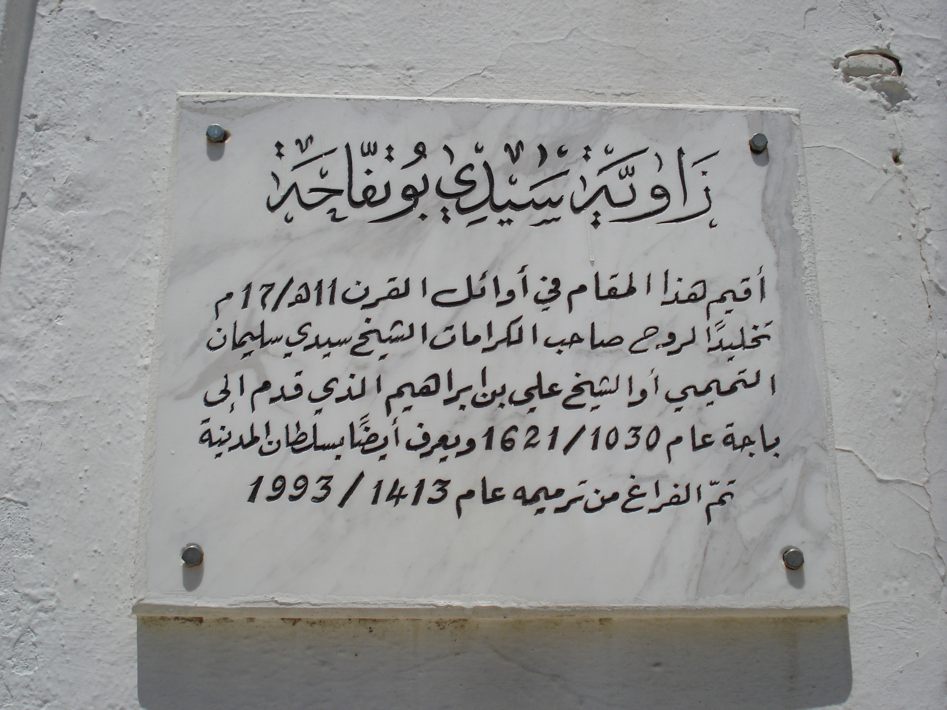 Plaque indicative du Mausolée Sidi Bouteffaha, Béja, Tunisie